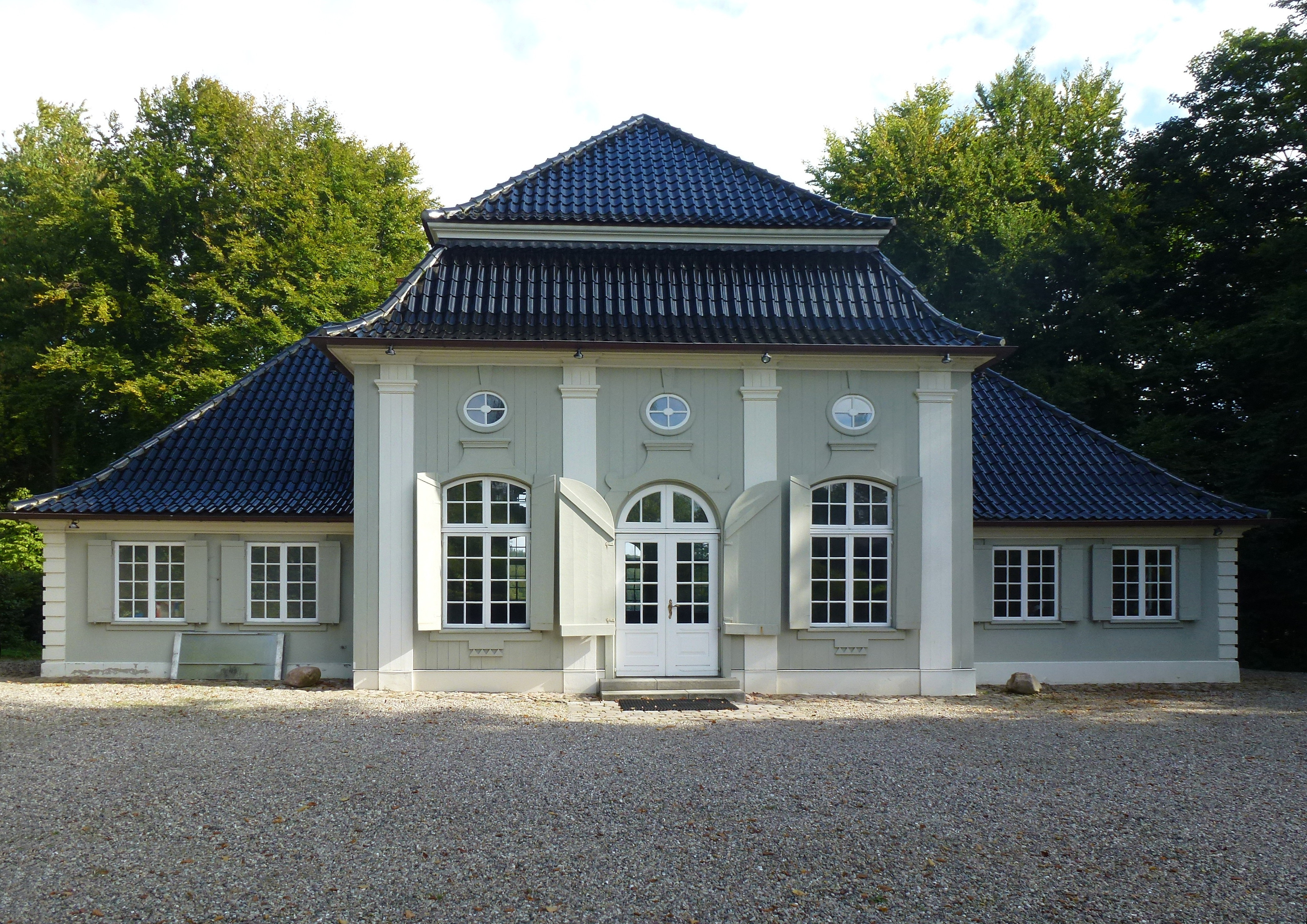 Das Jagdschoss am Ukleisee